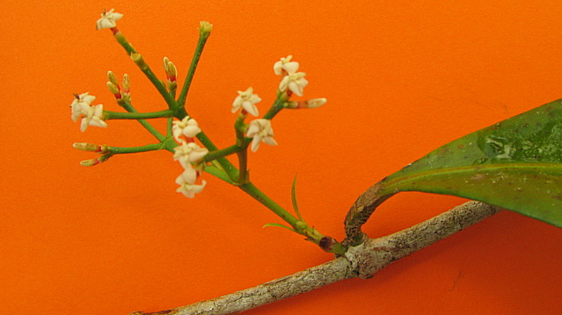 Ixora muelleri (Müll. Arg.) Bremek.